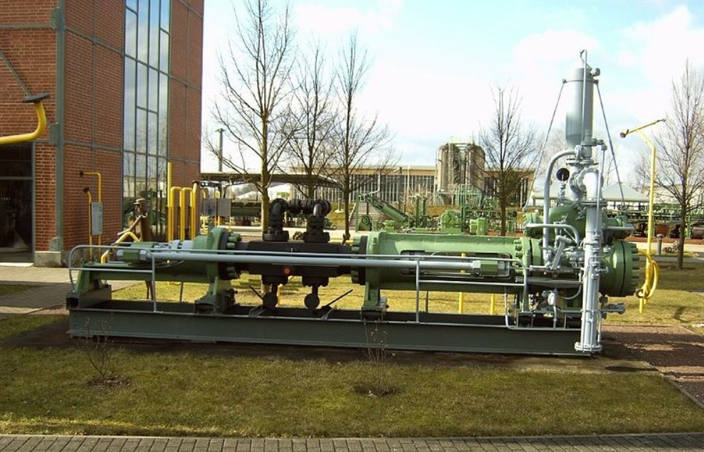 Die Kohlebreipresse ist eine der letzten Sachzeugen aus der Herstellungstechnologie von Benzin durch Hydrierung von Braunkohle. Sie arbeitete bis zur Abstellung der Kohlehydrierung 1957/58 als Kohlebreipresse und bis 1974 als Kontaktbreipresse. Danach bis 1994 als Kondensatwasserpumpe. Der Antrieb: Medium: Kondenswasser mit Bohröl, auch Treibwasser genannt (Mischungsverhältnis 20:1) Bedarf: 8 m³/m³ Kohlebrei Hubzahl: max. 28/min, einstellbar durch Treibwasser-Einlassventil (Fördermenge) Steuerzylinder mit Steuerkolben: Verteilt Treibwasser in den vorderen und hinteren Teil des Treibzylinders und dadurch erfolgt der wechselseitige Antrieb. Hilfssteuerung: Wechselseitige Impulse an Steuerkolben. Steuerventil: Dient zur Einstellung der Hublängen. Windkessel: Enthält Treibwasser und Stickstoff (mind. 1 bar, max. 4 bar), dient zur Abpufferung auftretender Druckstöße. Hebel für Saugventile: Betätigen der Einlassventile beim Anfahren der Kohlebreipresse, damit das Medium ohne Behinderung durch die Ventilkegel in den Arbeitszylinder gelangen kann. Erläuterung: Kohlebrei-Schweröl mit ca. 47% Braunkohlenasche, der Eisenoxid beigemischt ist. Ausgangsprodukt zur Gewinnung von Kraftstoffen durch Hydrierung bei ca. 250 bar und ca. 450°C Kontaktbrei-Schweröl mit ca. 25% Feststoffgehalt (Braunkohlenasche mit Eisenoxid versetzt) als Katalysator in der Masuthydrierung zur Gewinnung von Kraftstoffen aus atmosphärischen Erdölrückständen bei ca. 250 bar und ca. 450°C. Kondensatwasser-Waschmedium zur Beseitigung von Salzablagerungen in den Hochdruckanlagen und zur Entfernung von Ammoniak aus dem Wasserstoff-Kreislaufgas. Nutzung: 1927-1957 als Kohlebreipresse 1957-1974 als Kontaktbreipresse 1974-1993 als Kondensatwasserpumpe